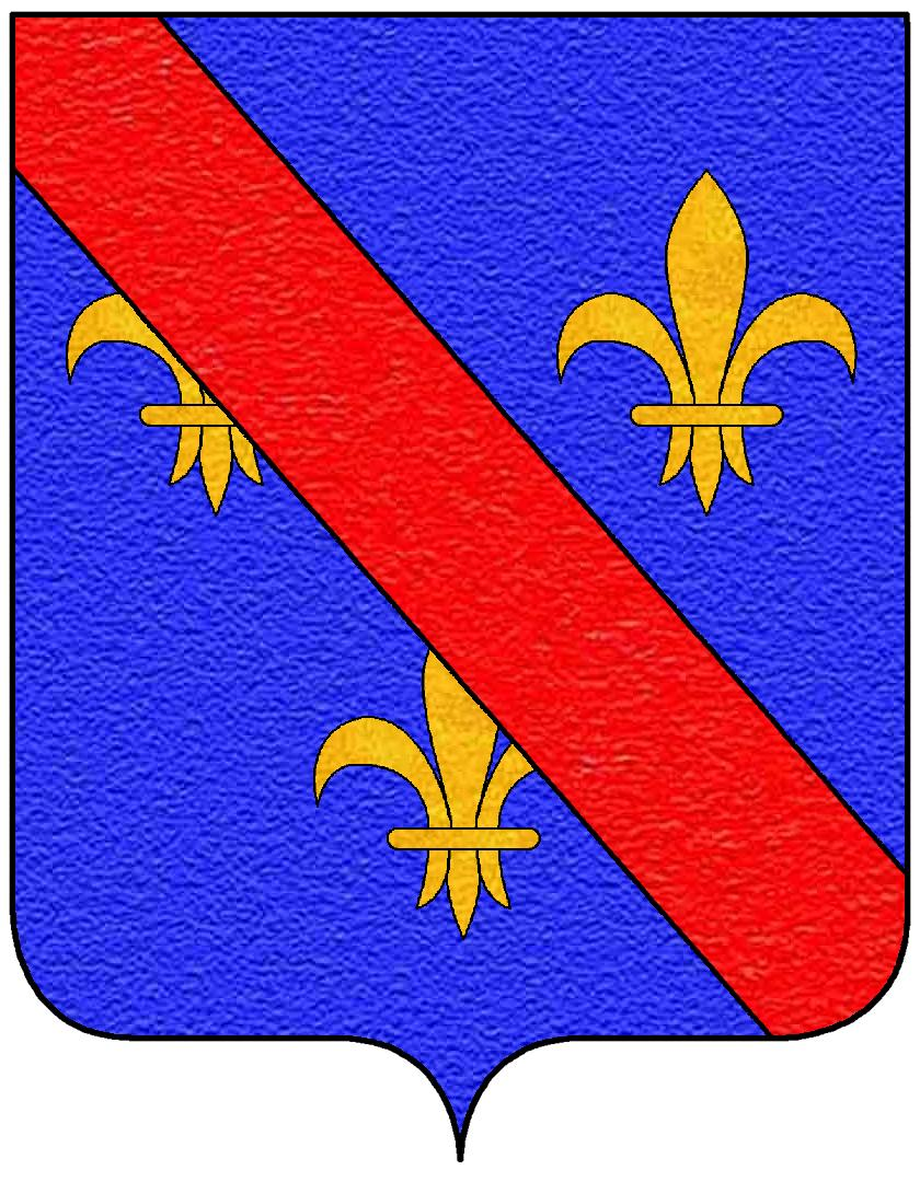 Stemma della famiglia Borboni Marchesi del Monte